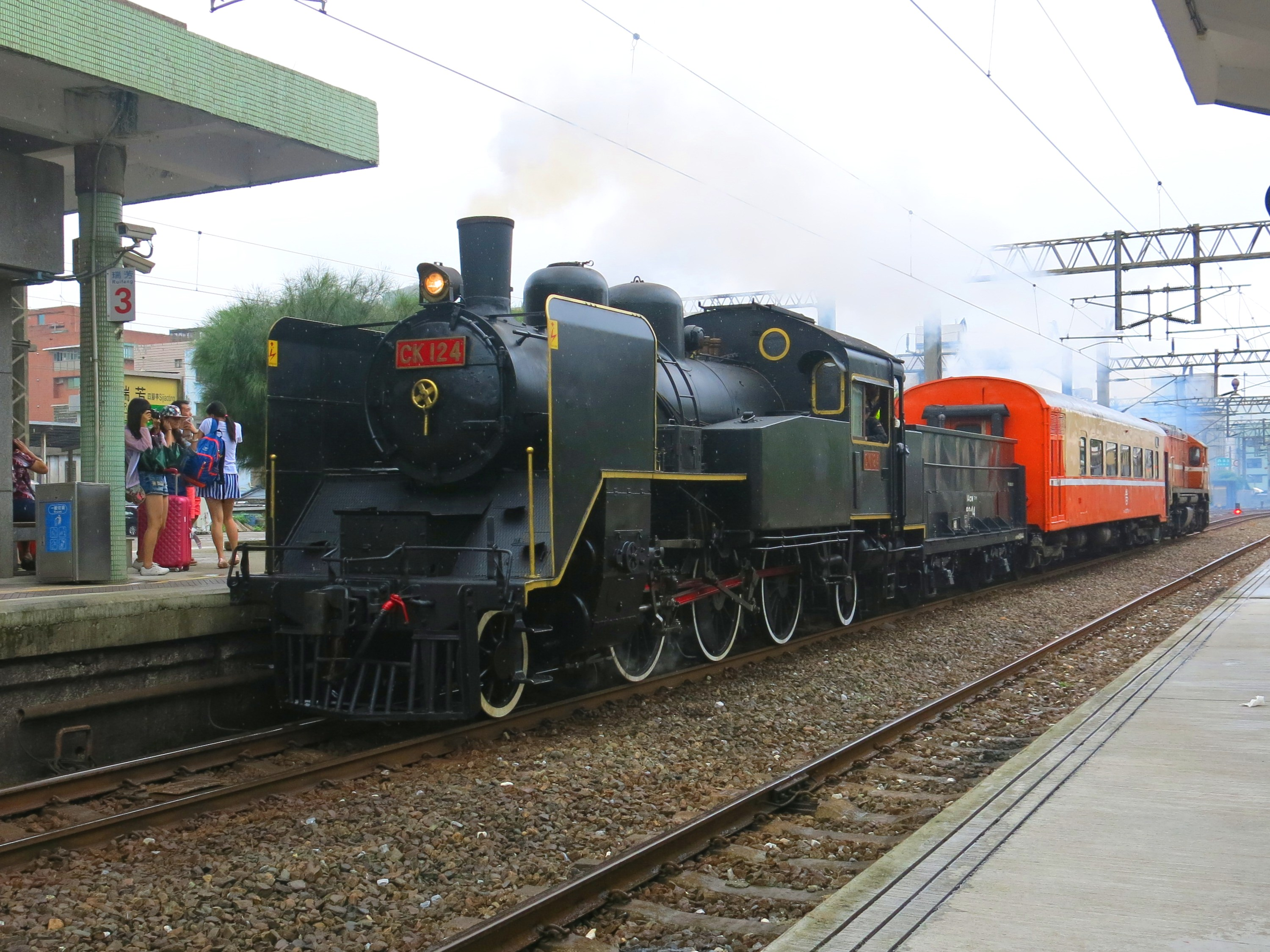 中文（台灣）: CK124試運轉，瑞芳站通過